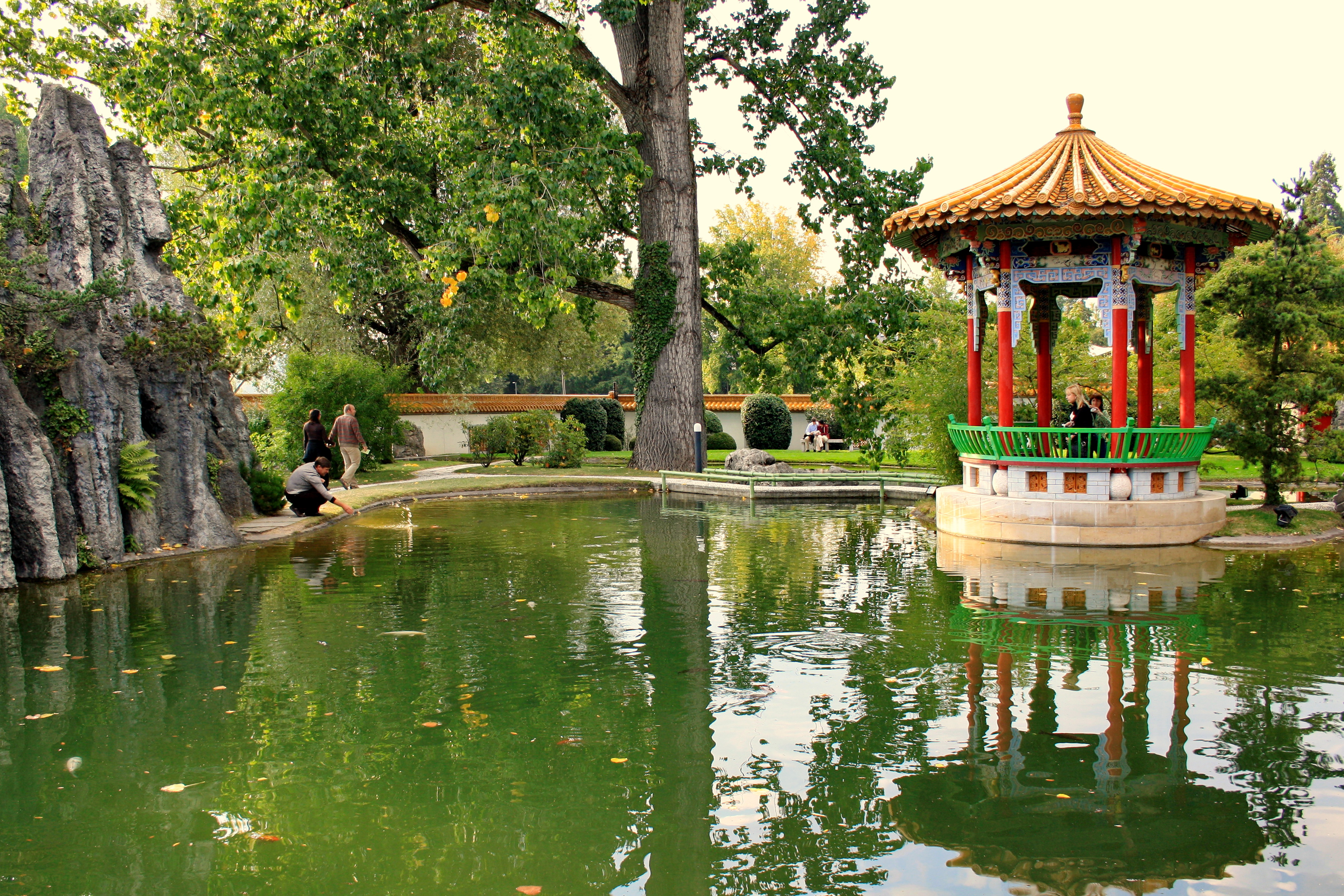 Chinagarten Zürich (Switzerland)